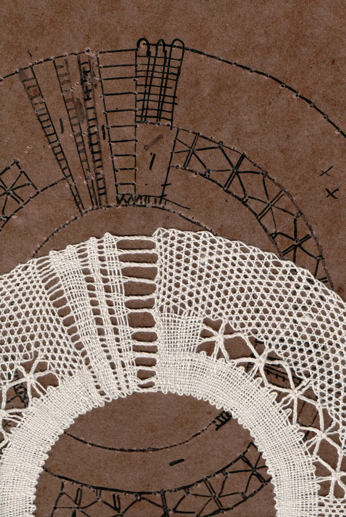 Klöppelspitze, Entwurf der deutschen Spitzenklöpplerin Leni Matthaei, ausgeführt von Christa Zimmermann